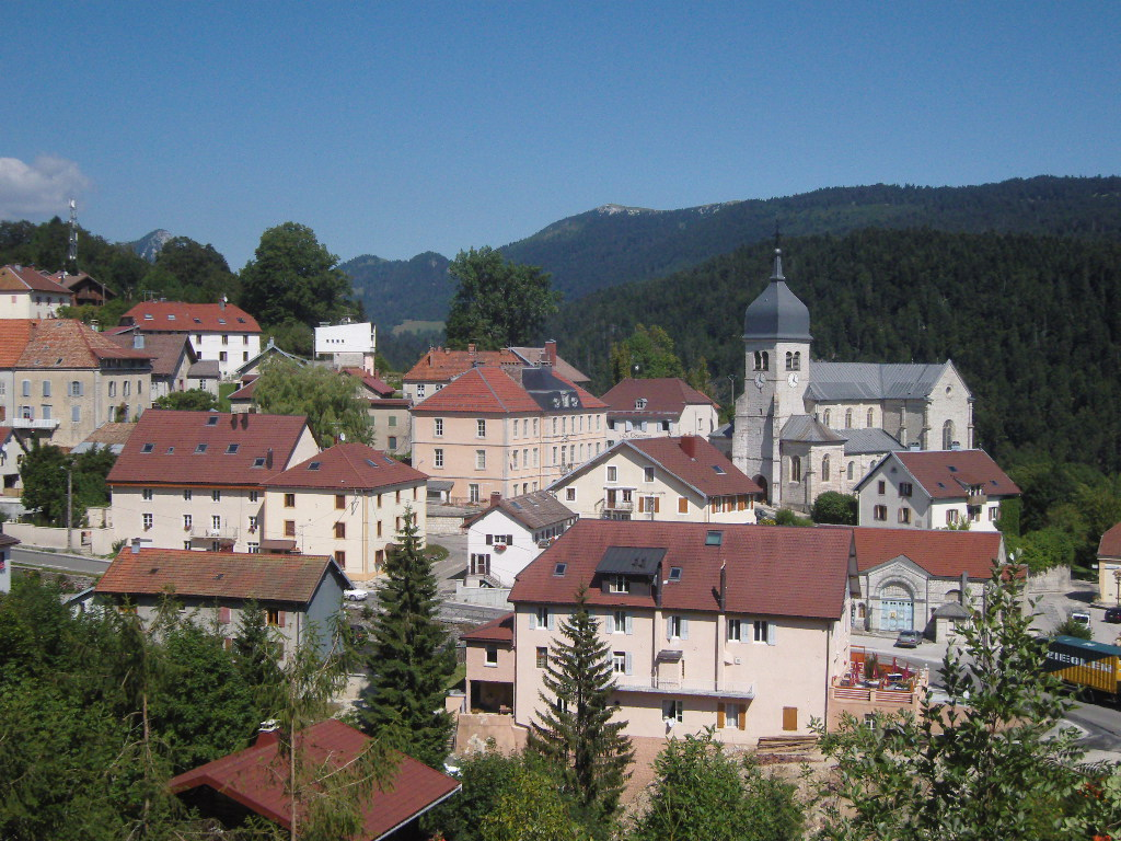 vue générale du village de Jougne (Doubs - France)